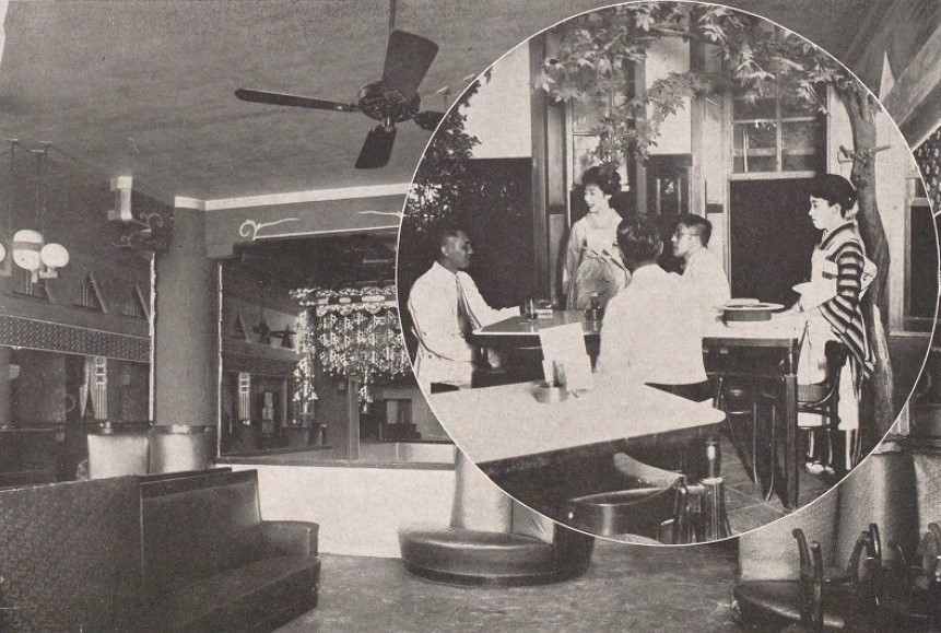 銀座のカフェ・タイガー（円内）、左はカフェ・クロネコの内部